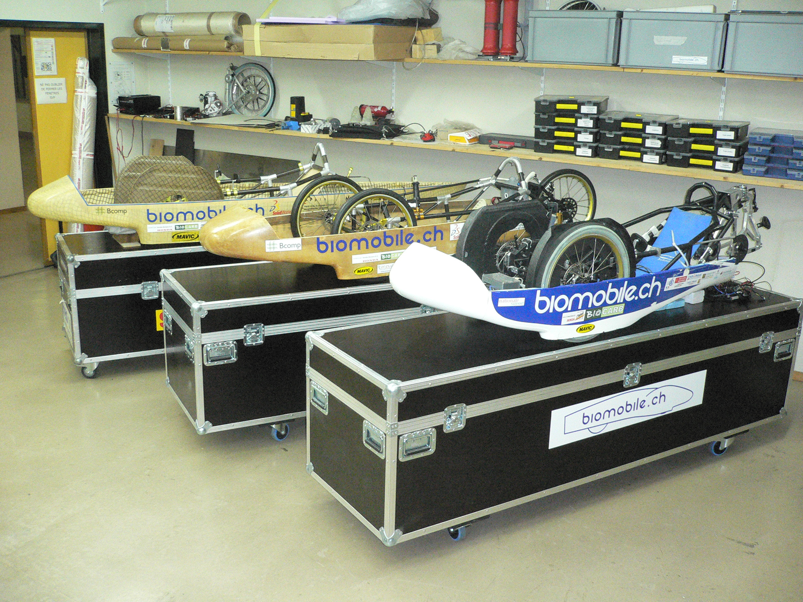 De la plus récente à la plus ancienne, de la gauche vers la droite.